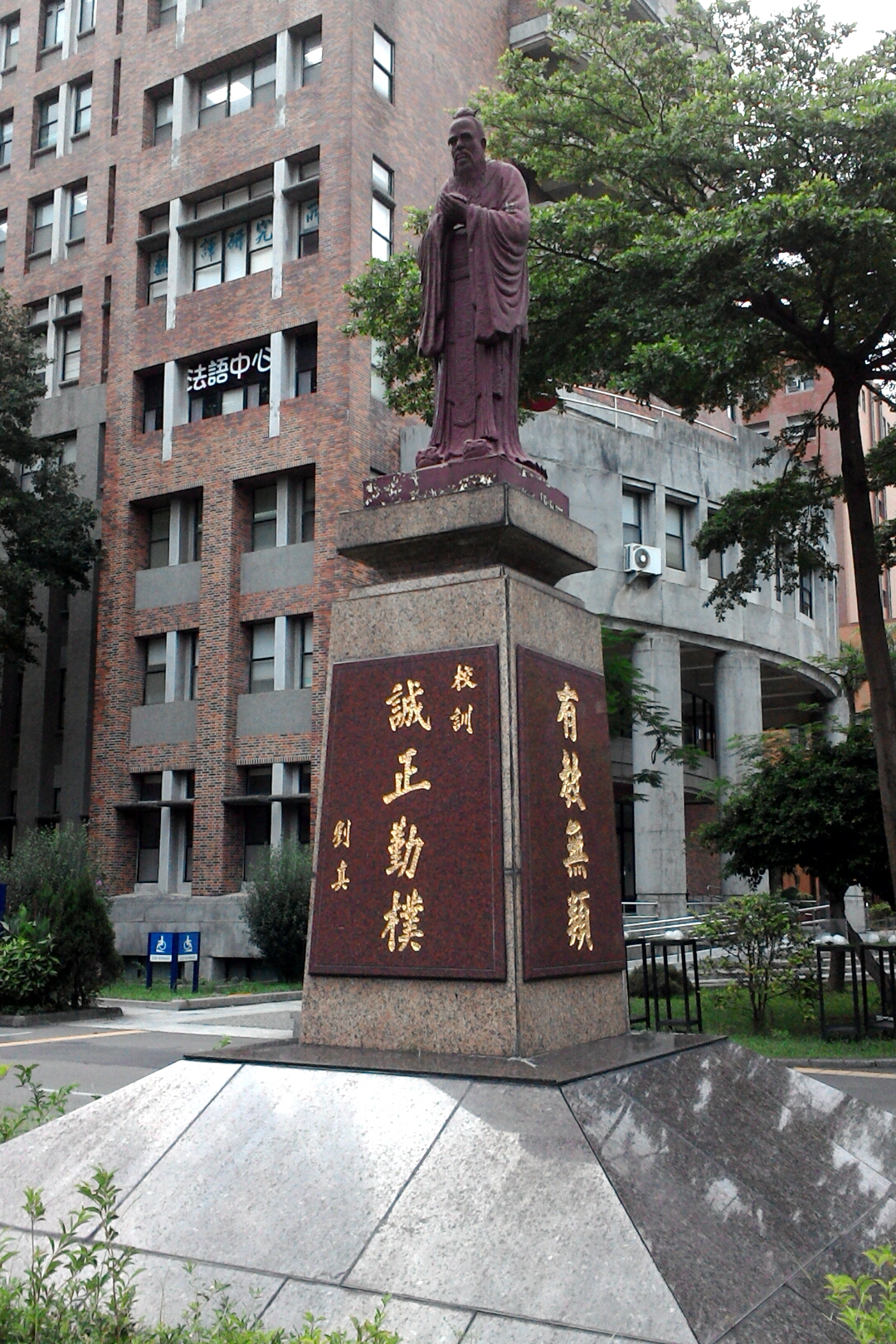 國立台灣師範大學內的孔子銅像,台北市大安區和平次分區錦安里